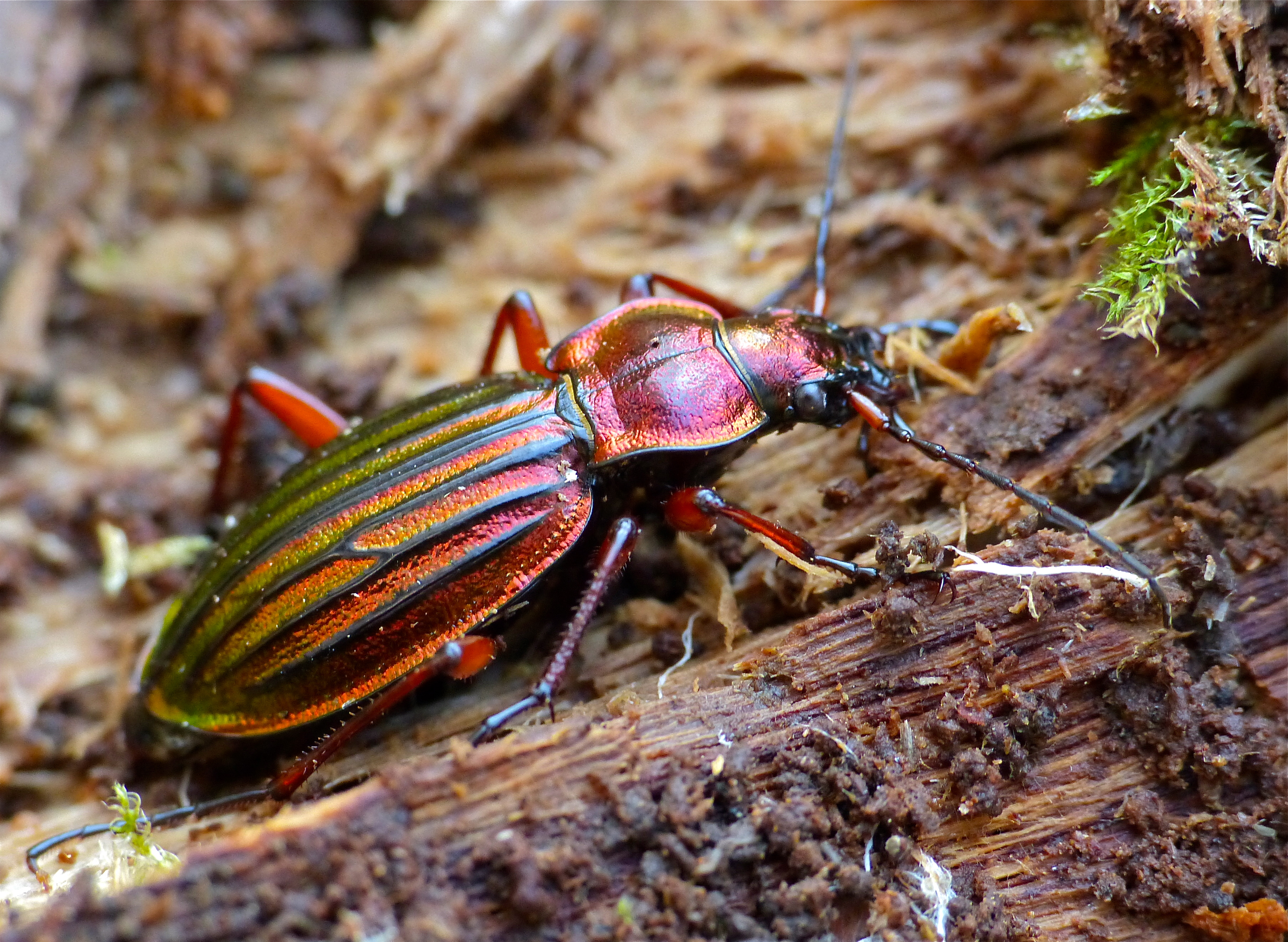 Forêt d' Ecouves, Orne, FRANCE